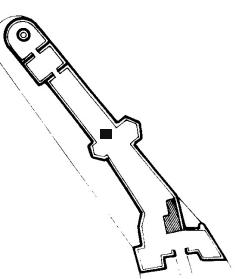 Pianta del Forte del Santissimo Salvatore a Messina.